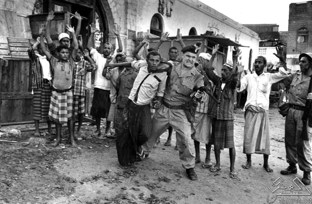 جندي بريطاني يعتقل احد الثوار من ابناء عدن المناوئين للاحتلال